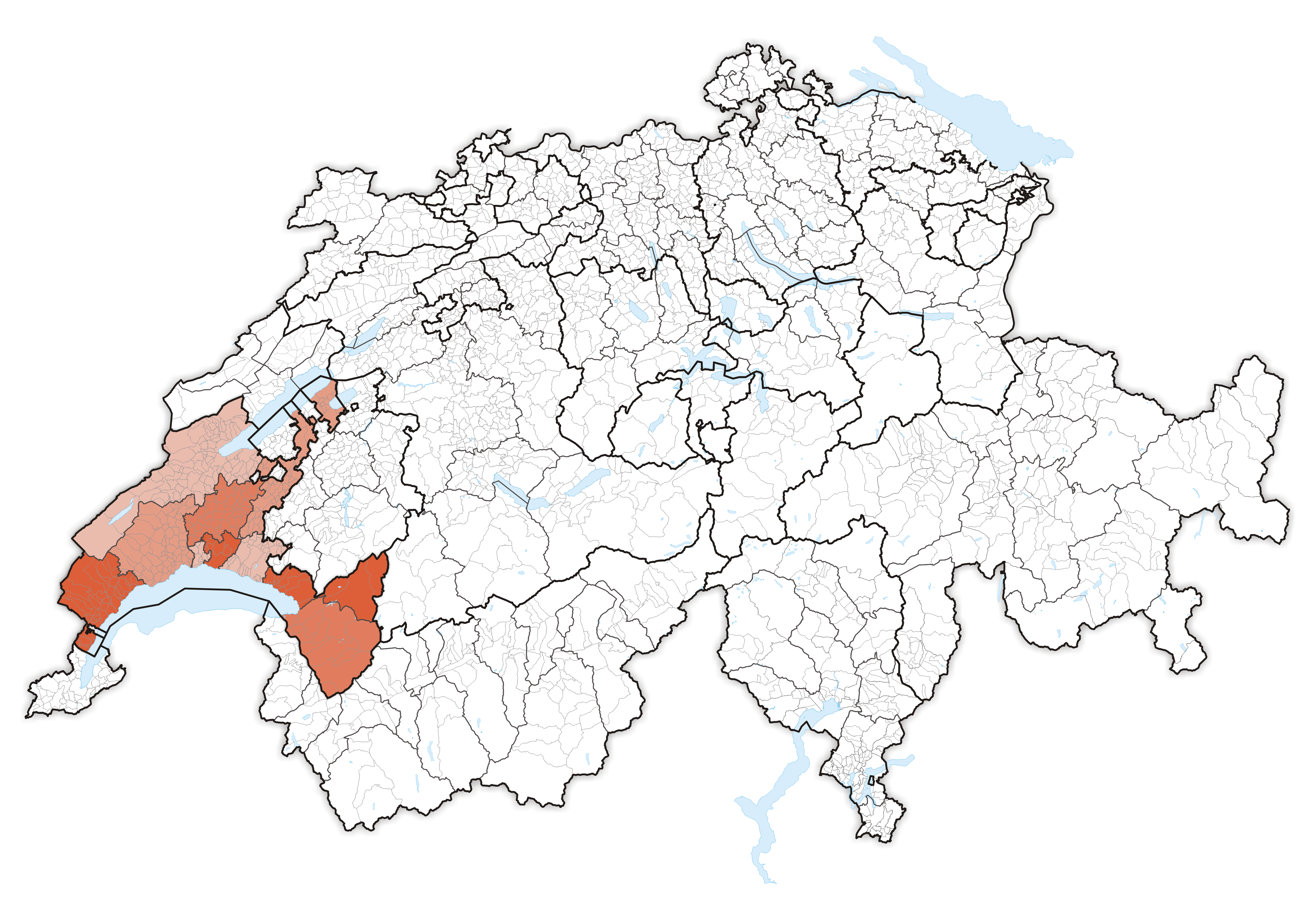 Canton Waadt